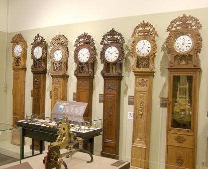 Horloges Saint-Nicolas des 18 et 19ème siècle